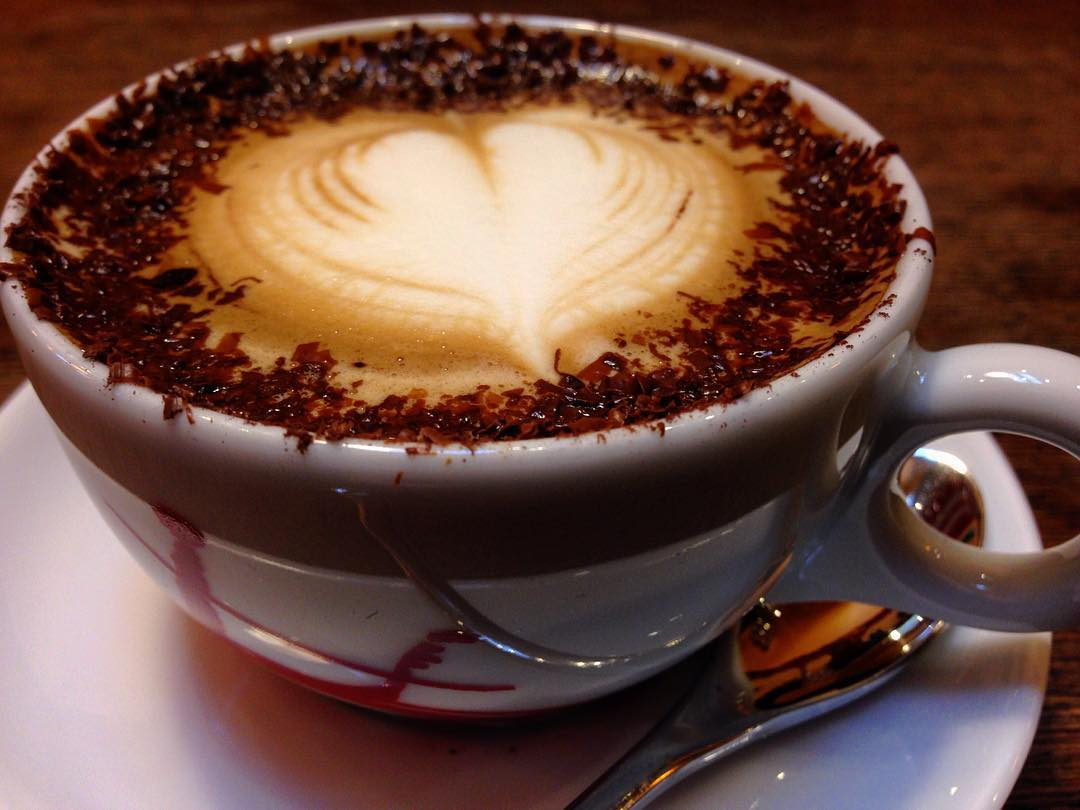 Marocchino